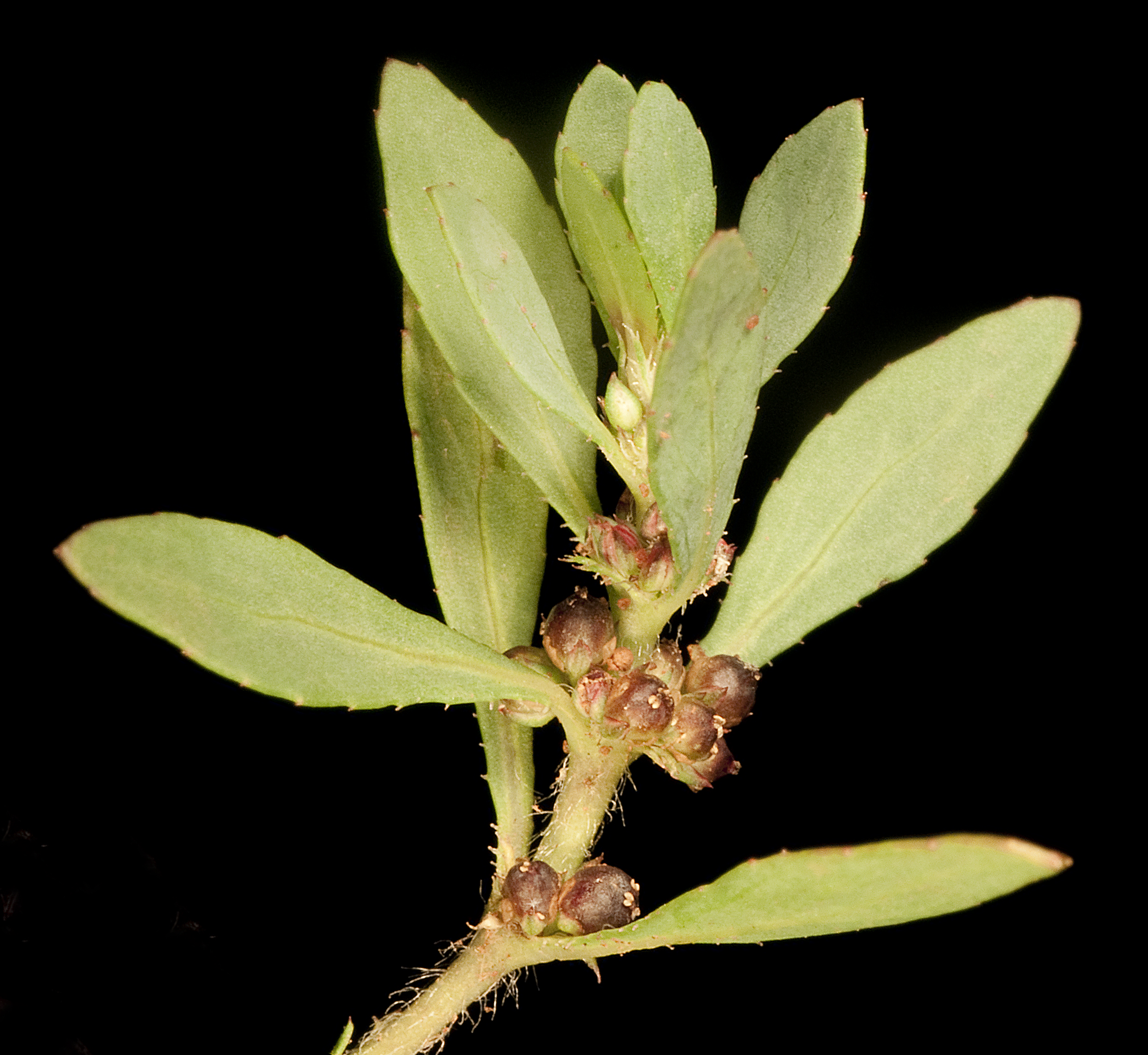 KRT4843